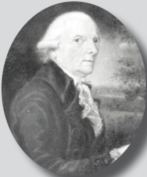 Melchior Siegfried Hofmeister (1727-1797), Amtmann in dat Amt Stood-Gothenborg von 1765 bet 1797